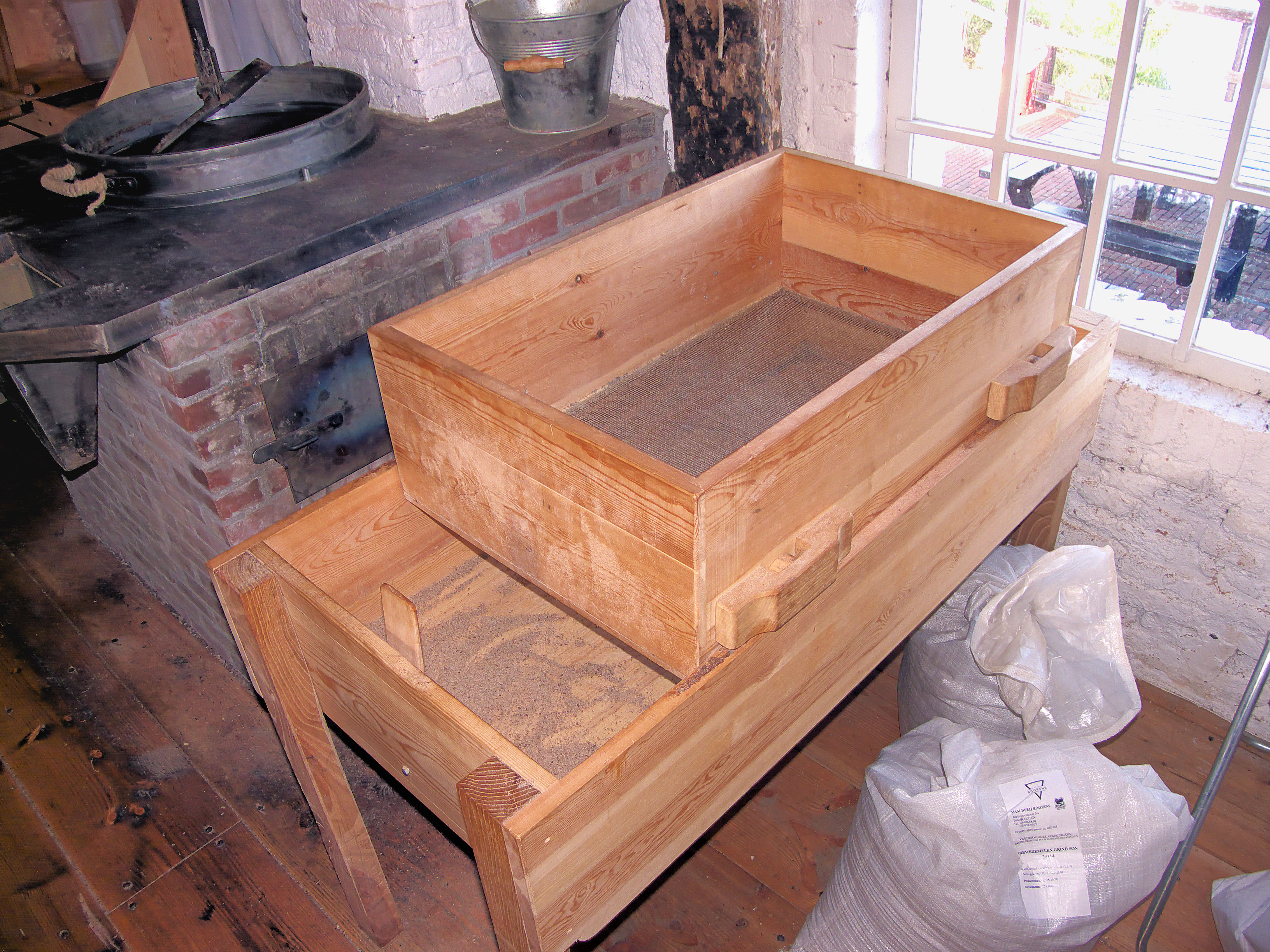 Kilsdonkse molen, Dinther, tripzeef